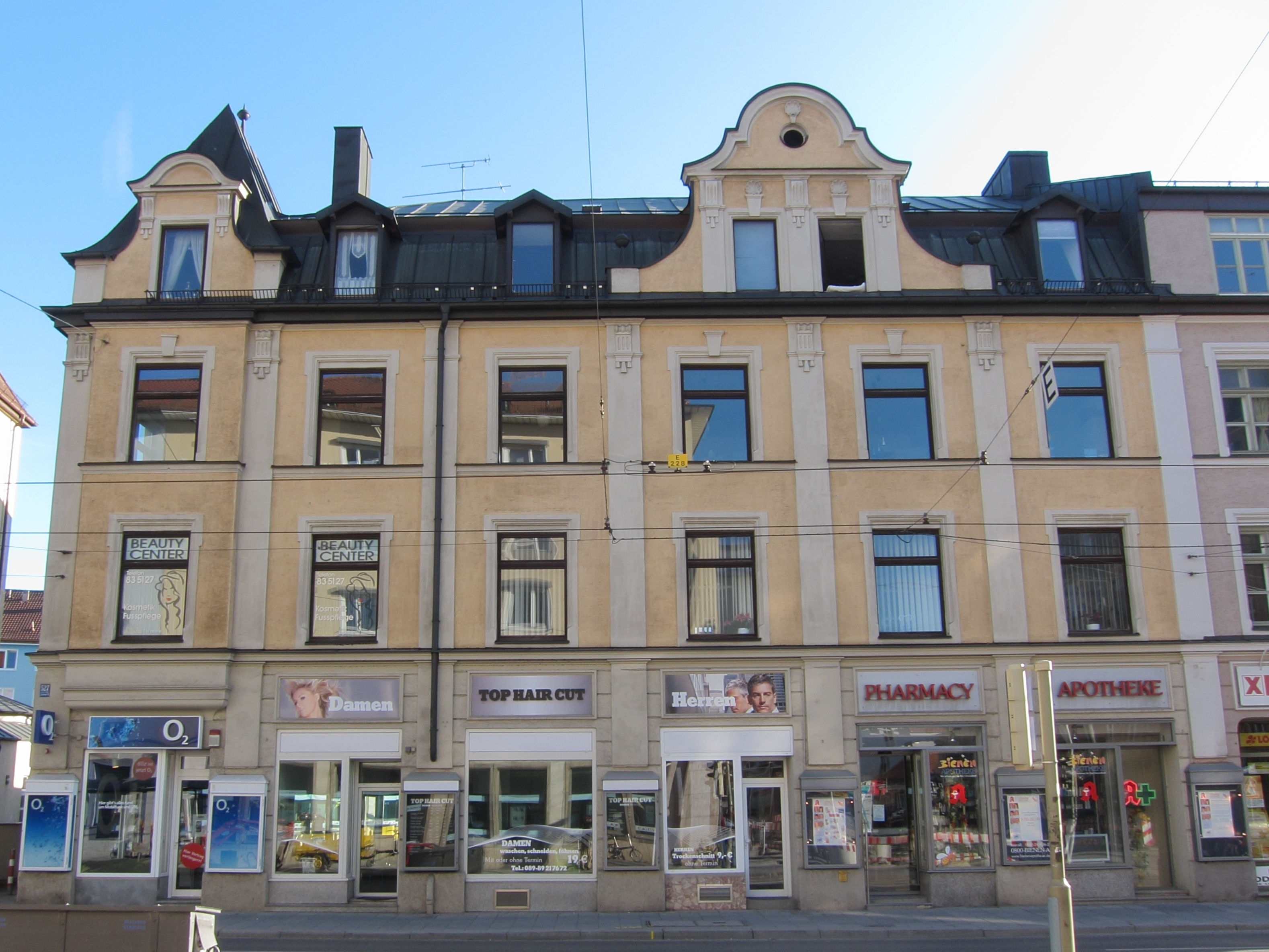 Landsberger Straße 527; Wohn- und Geschäftshaus, neubarocker Dekor, 1897 von Johann Hieronymus; Gruppe mit Nr. 529; vgl. auch Ensemble Ortskern Pasing.